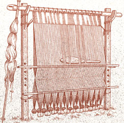 Вертикальный ткацкий станок с Фарерских островов (реконструкция Гейерли)